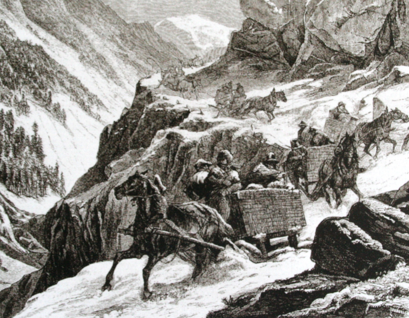 Splügengalerie Warentransport im Winter